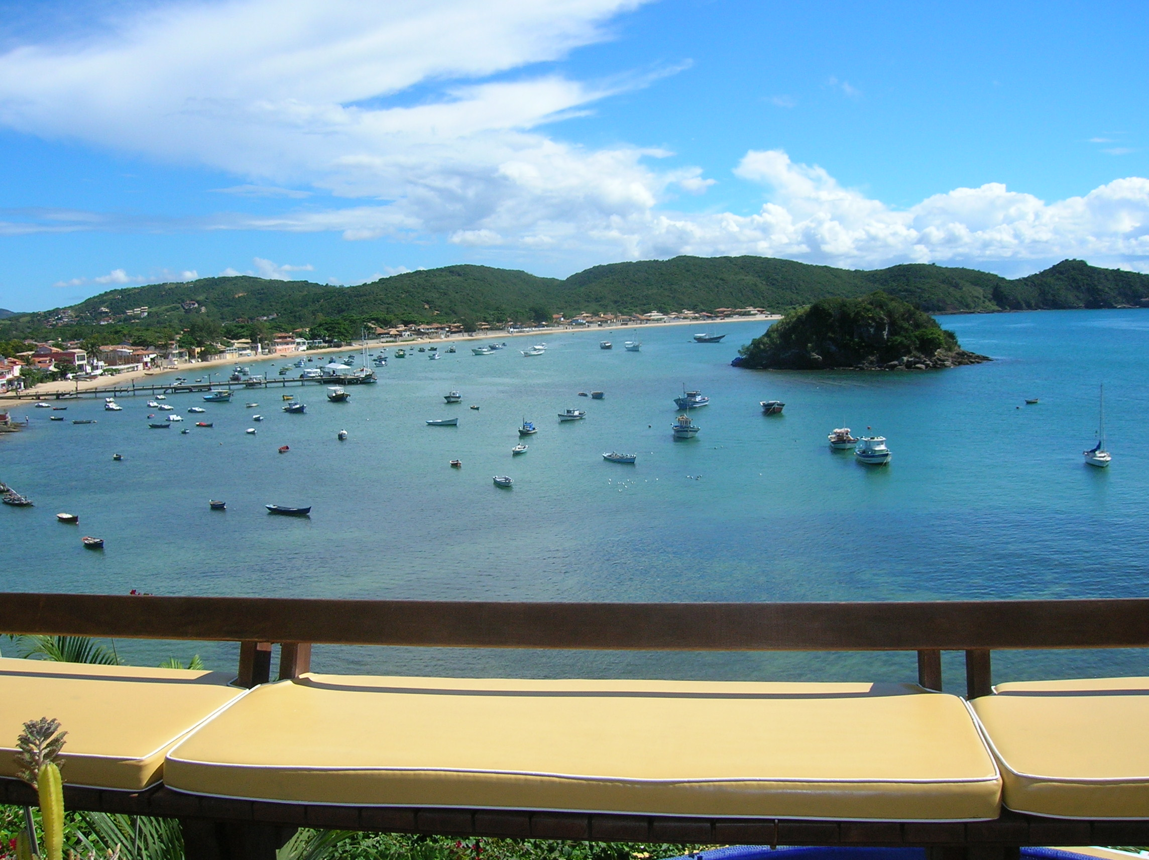 Buzios vista de Paraia do canto